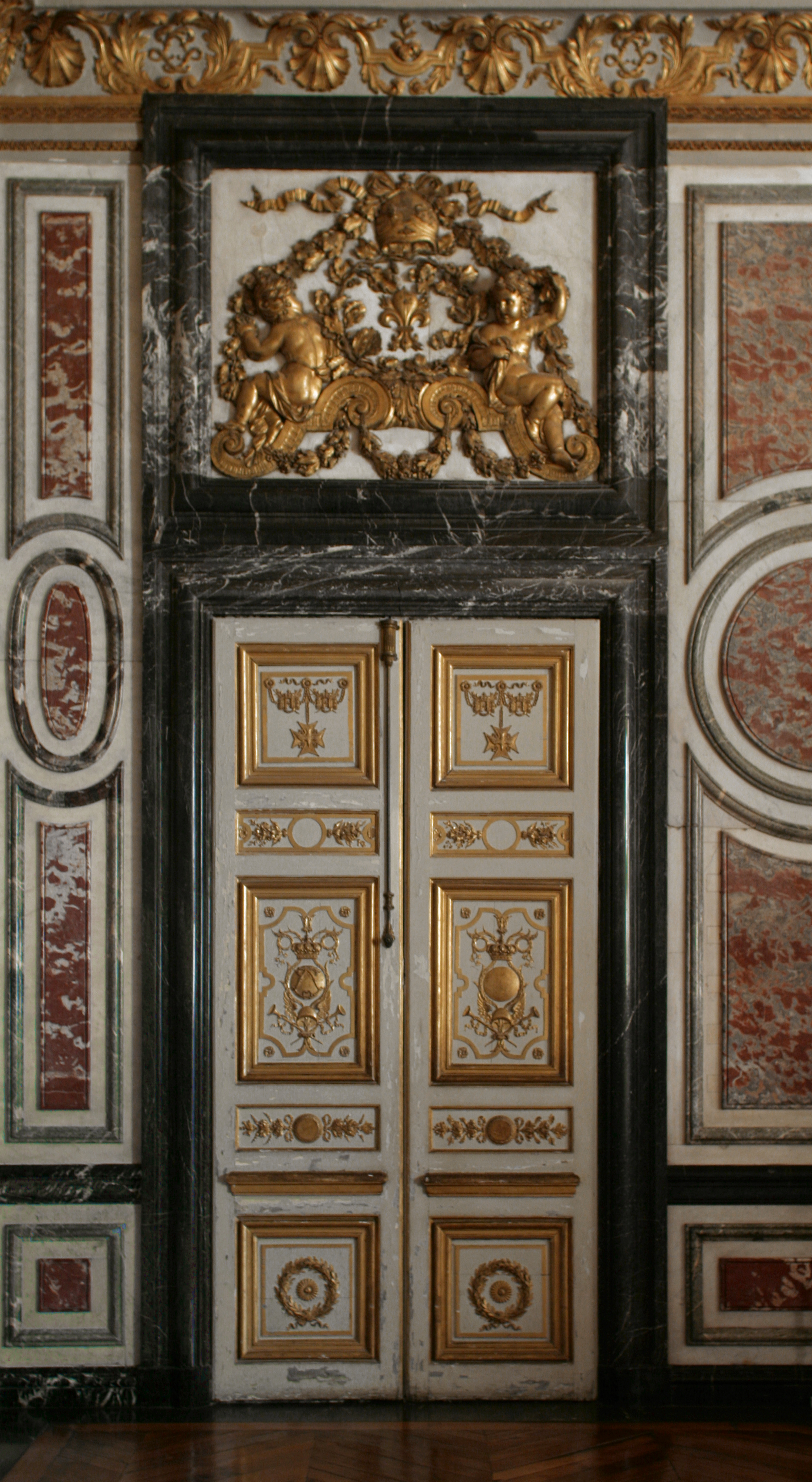 Château de Versailles, salle des gardes de la reine, porte.